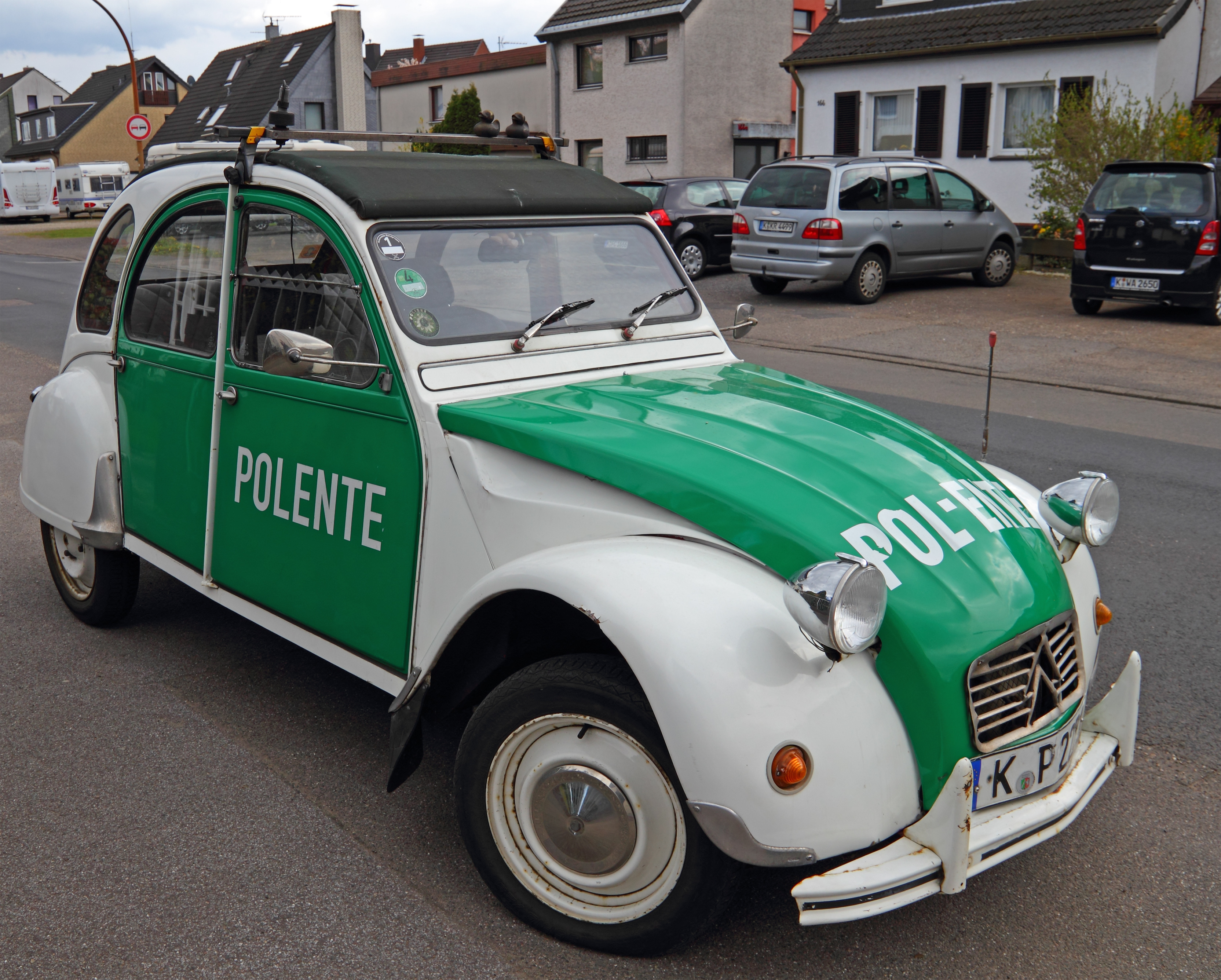 Ein als Polizeiwagen bemalter Kölner Citroen 2CV.